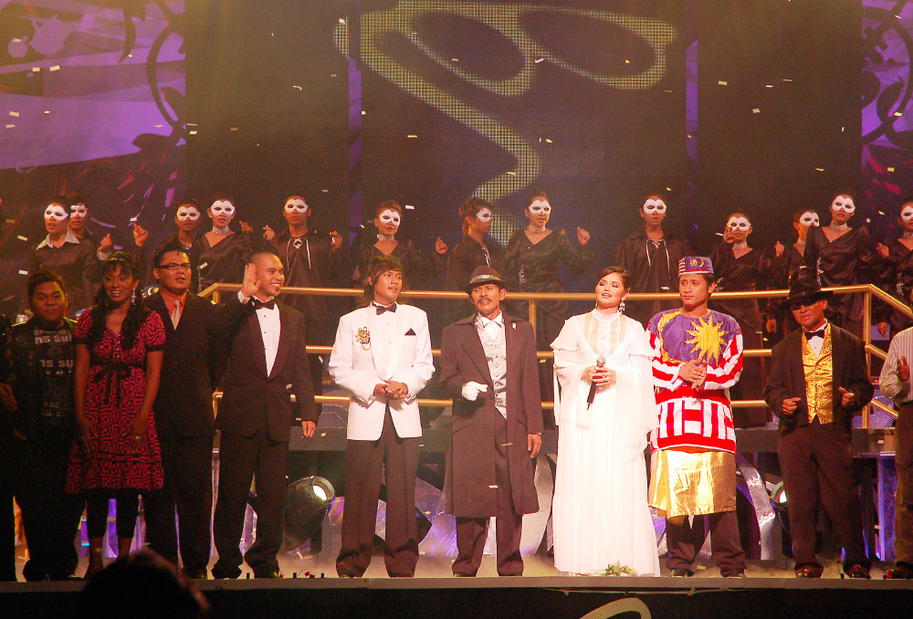 Siti Nurhaliza at Konsert Tribute Sudirman.